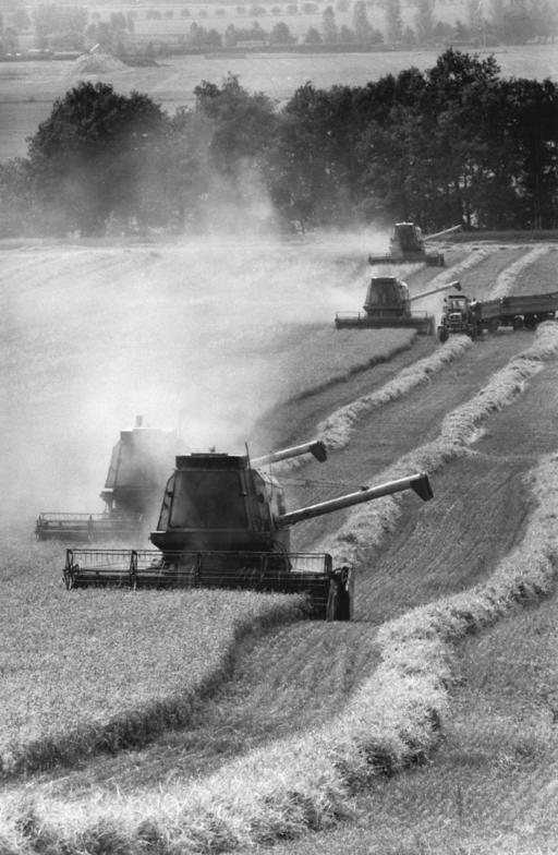 LPG Großbothen, Getreideernte ADN-ZB Kluge 13.8.86-zin- Bez. Leipzig: Ernte. Die Weizenernte ist in der LPG (P) Großbothen, Kreis Girmma, derzeit in vollem Gange. -Siehe auch Motiv 1986-0813/21N- Information added by Wikimedia users. Original image caption: Bundesarchiv, Bild 183-1986-0813-020 Foto: Kluge, Wolfgang | 13. August 1986